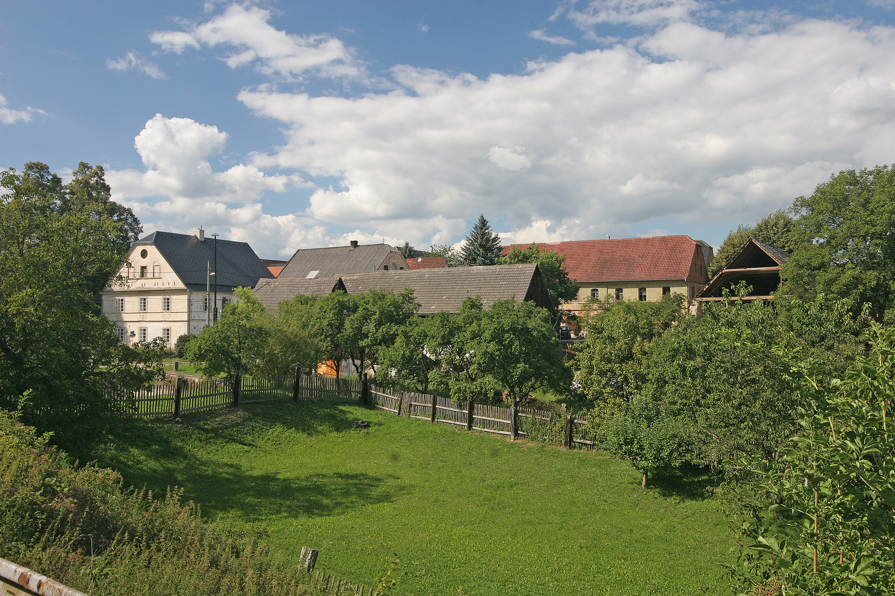 Domašice čp. 18